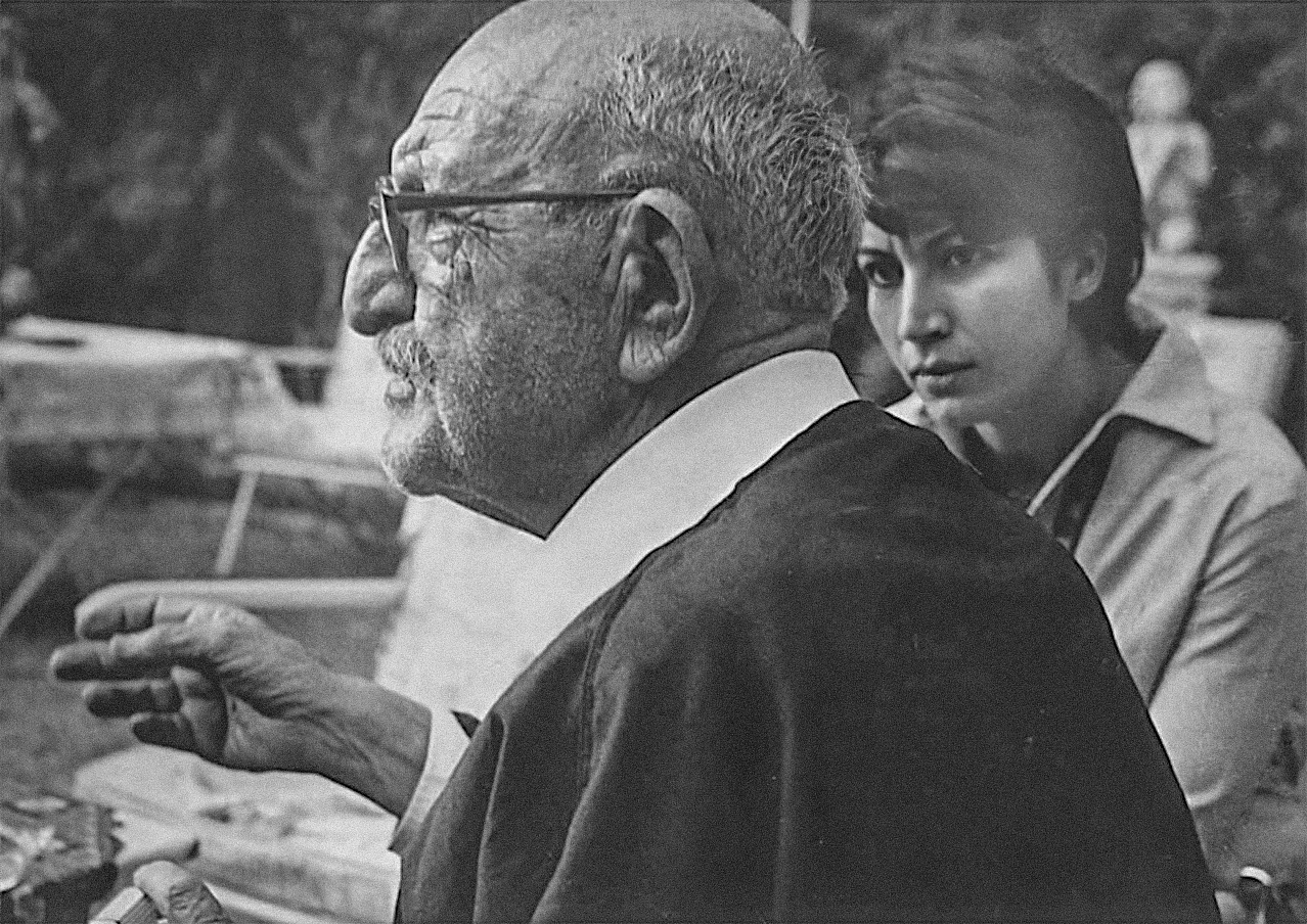 دوستعلی خان معیرالممالک و فروغ فرخزاد در خانهٔ فروغ، منتشرشده در هفته‌نامهٔ سپید و سیاه